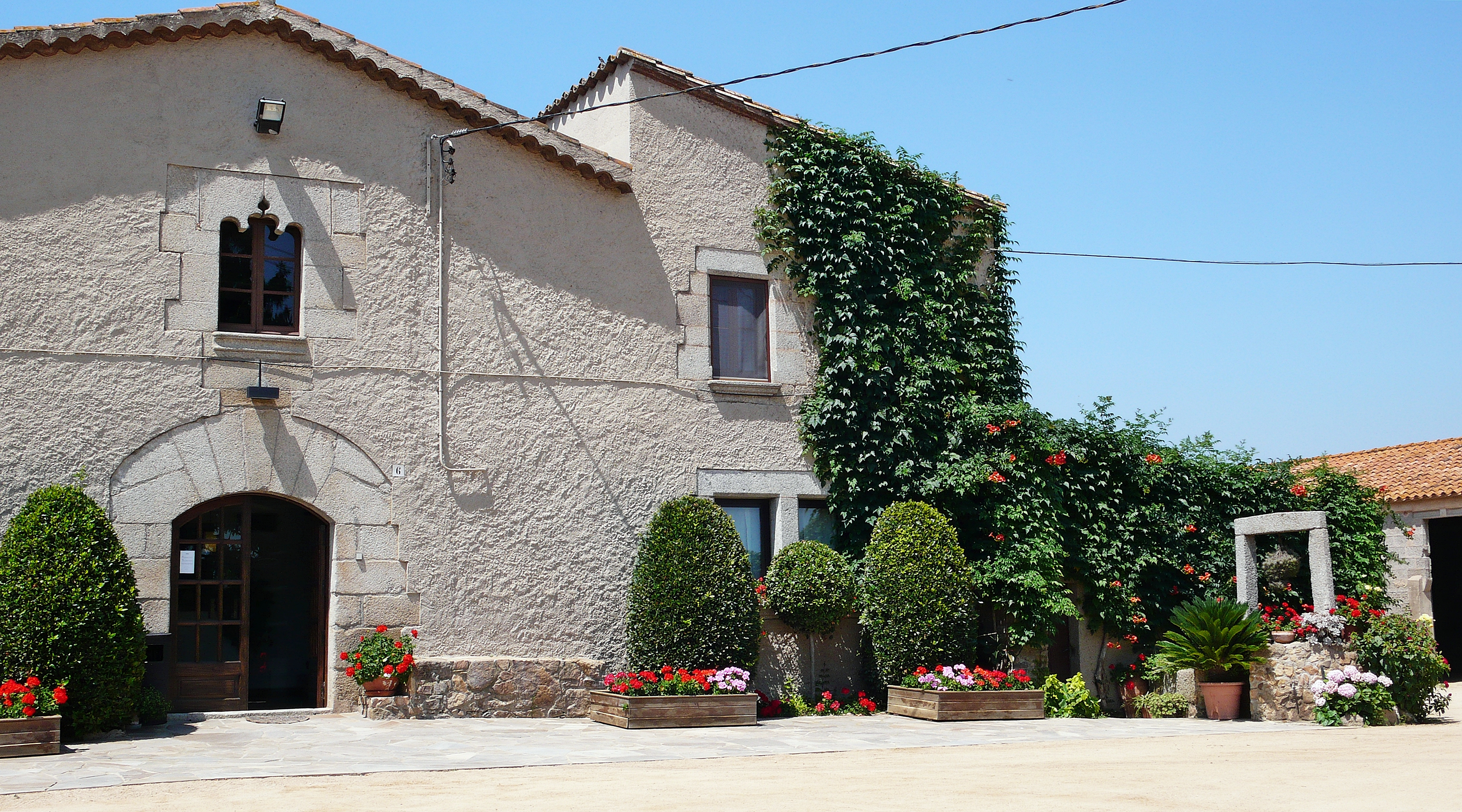 masia de can caselles-tordera 2014